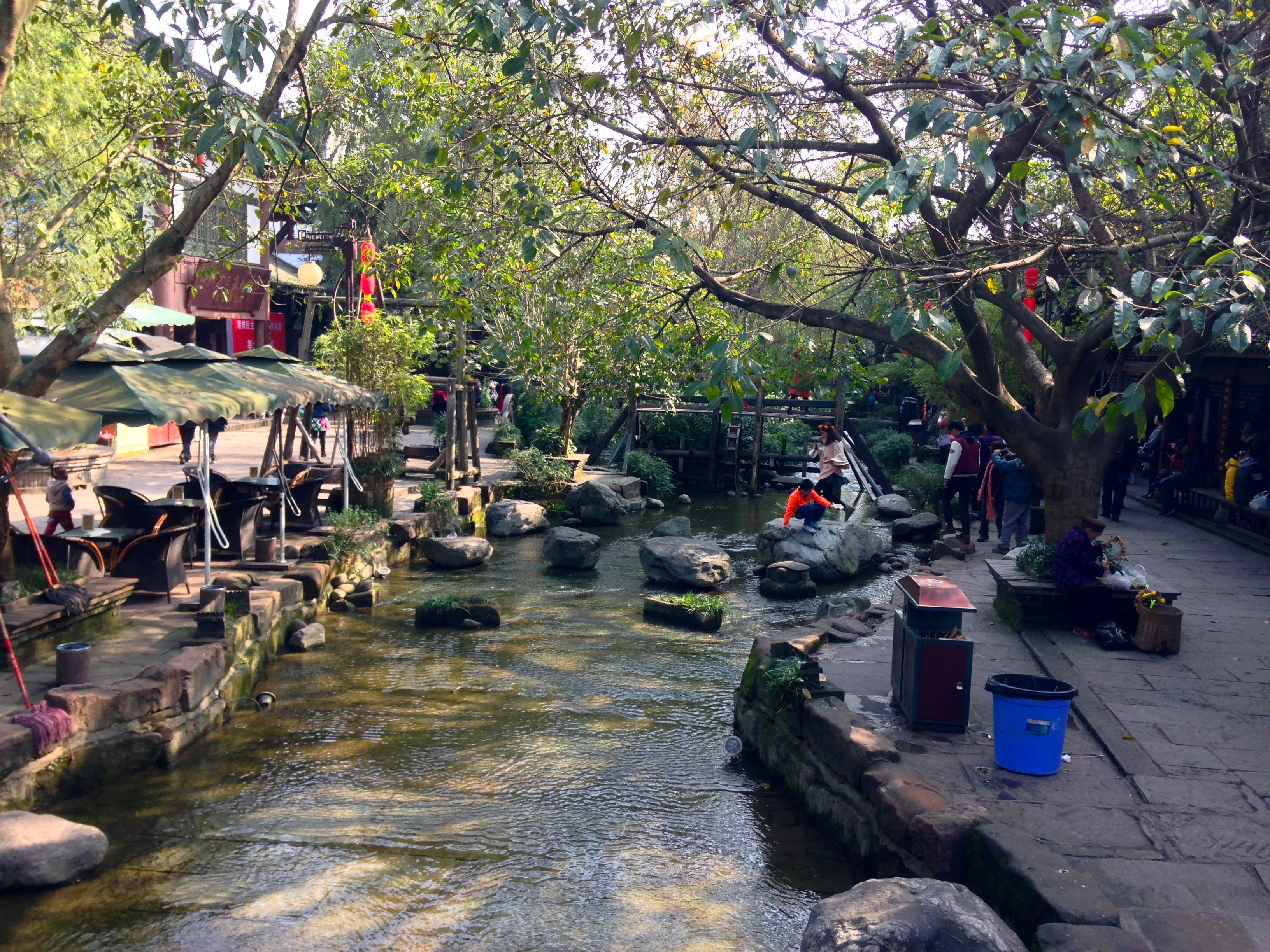 Shuangliu, Chengdu, Sichuan, China